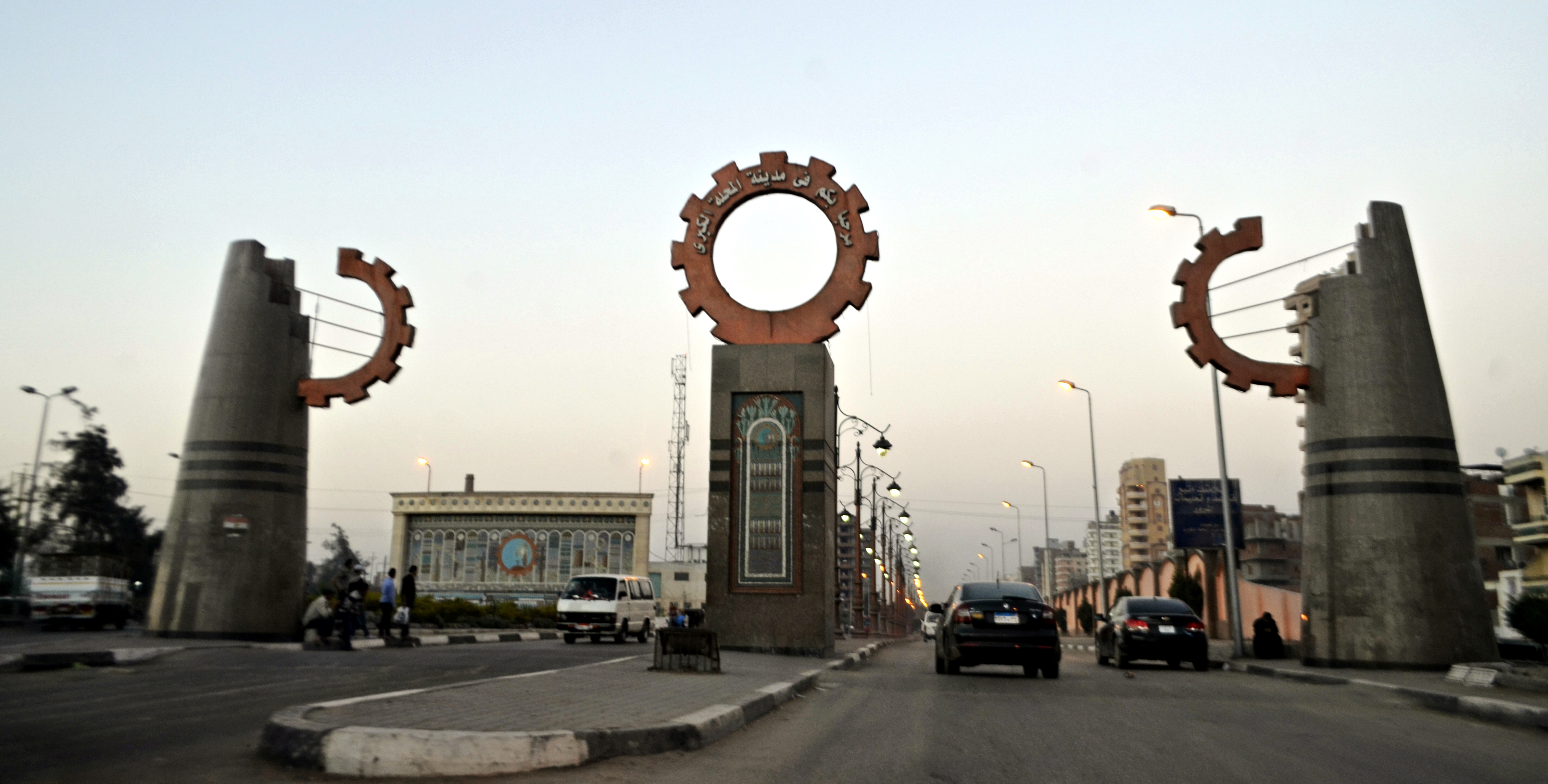 بوابة مدينة المحلة الكبرى من على طريق طنطا، مصر.